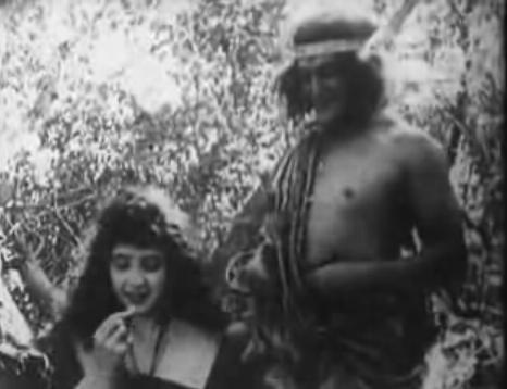 Fotogramma del film del 1918 Tarzan of the Apes